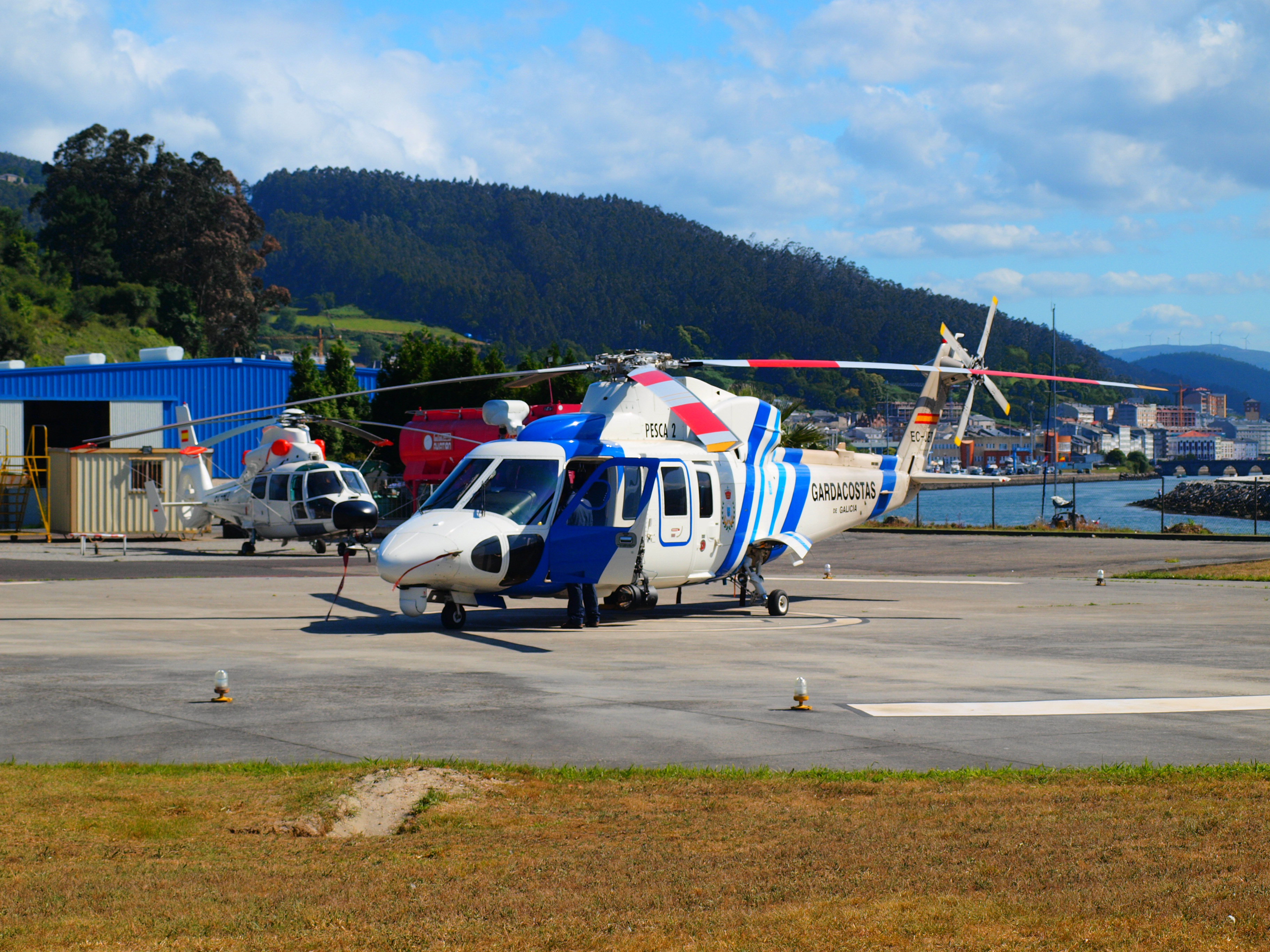 Sikorsky S76 C+ EC-JET (Pesca 2) y Aerospatiale AS 365 N2 EC-HCL (Antiguo Pesca 1) en el Helipuerto Costa Norte